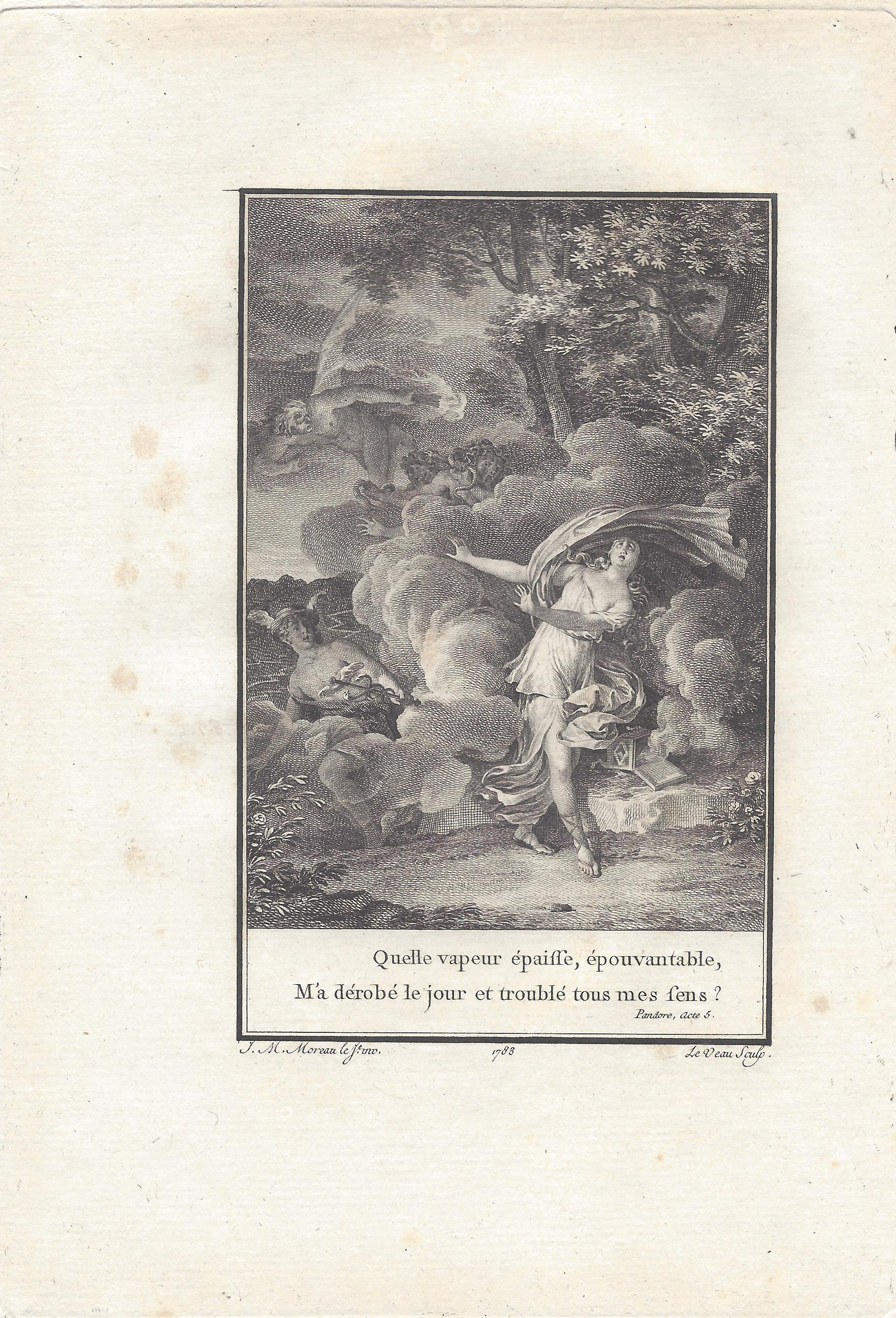 Voltaire: Pandore Akt 5 Kupferstich von Jean Jacques Le Veau nach Jean-Michel Moreau